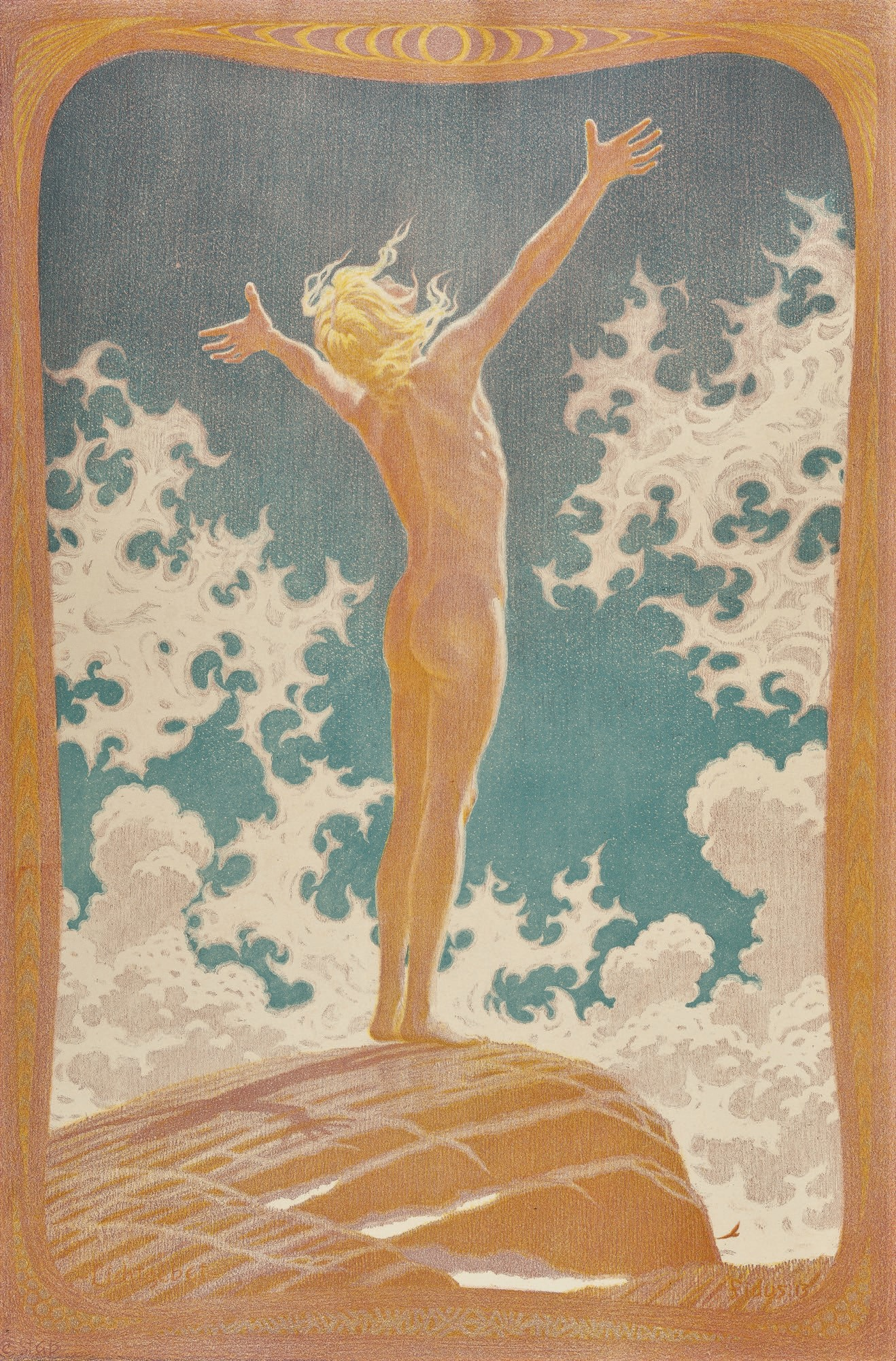 Fidus - Lichtgebet, Farblithographie. 1913. 63,5 x 42,3 cm